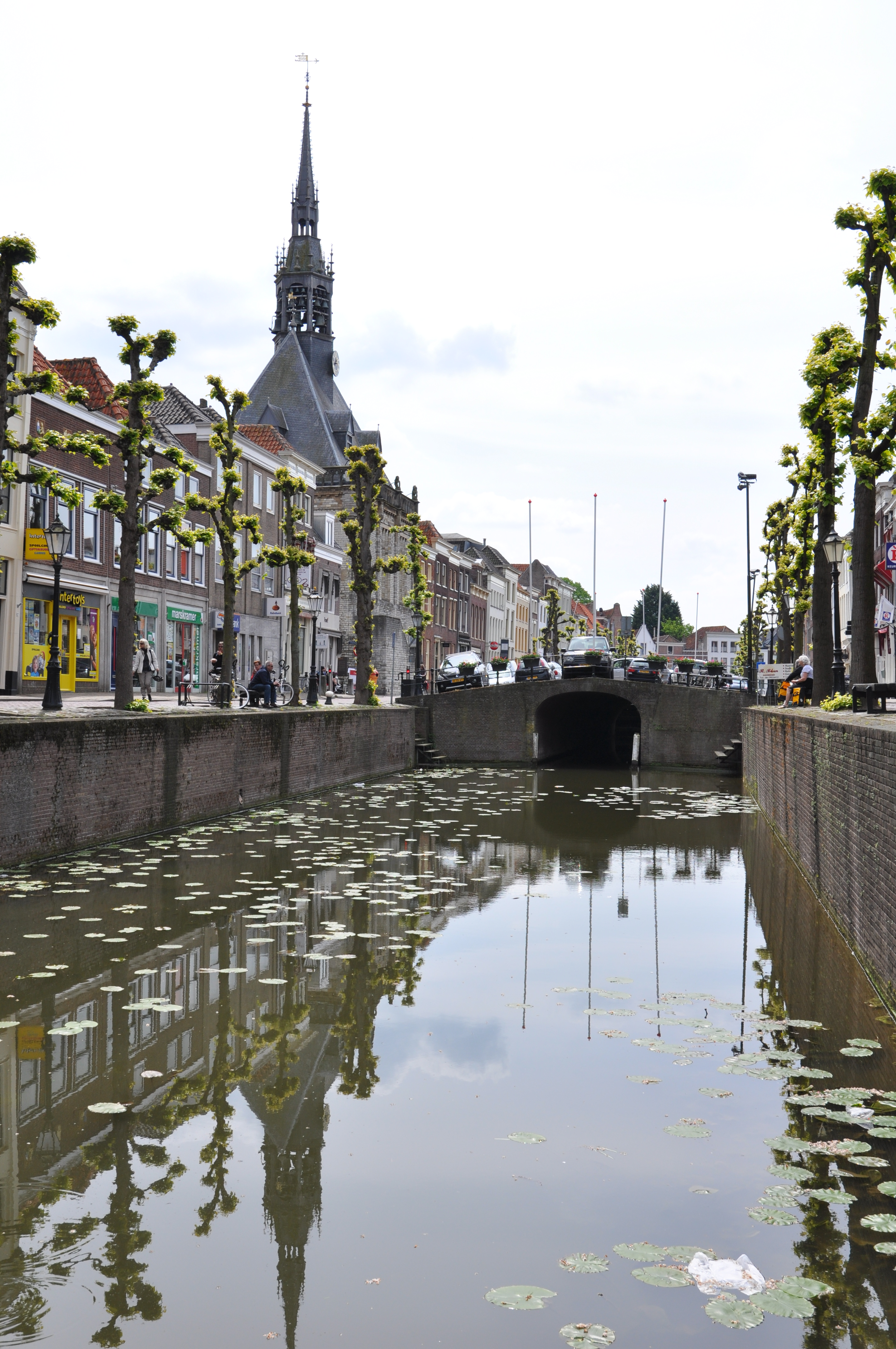 Gracht in het centrum van Schoonhoven.